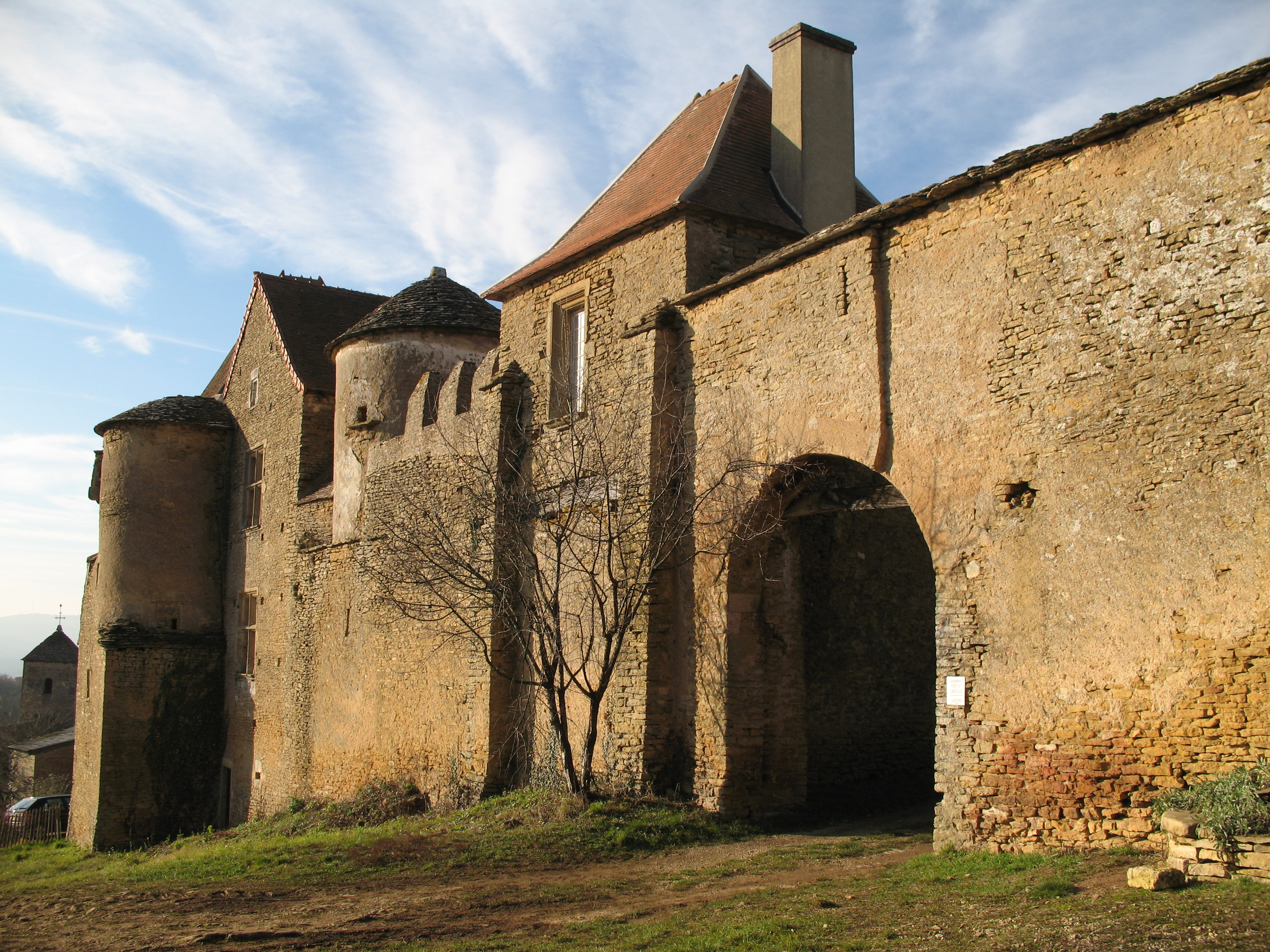 château de Bissy-sur-Fley (Saône-et-Loire)